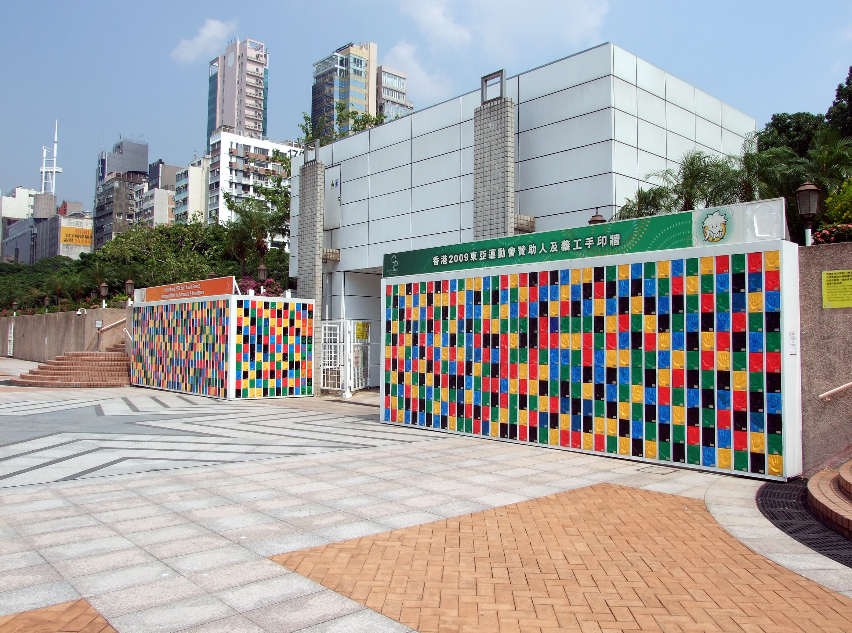 中文（香港）: 位於九龍公園的2009年東亞運動會贊助人及義工牆